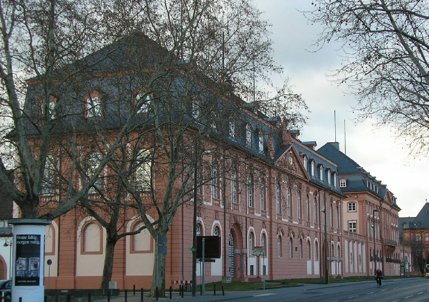 Bildmotiv: Barockensemble Zeughaus und Deutschhaus in Mainz; Quelle:Eigene Fotografie vom Januar 2005; Lizenz: GNU-FDL